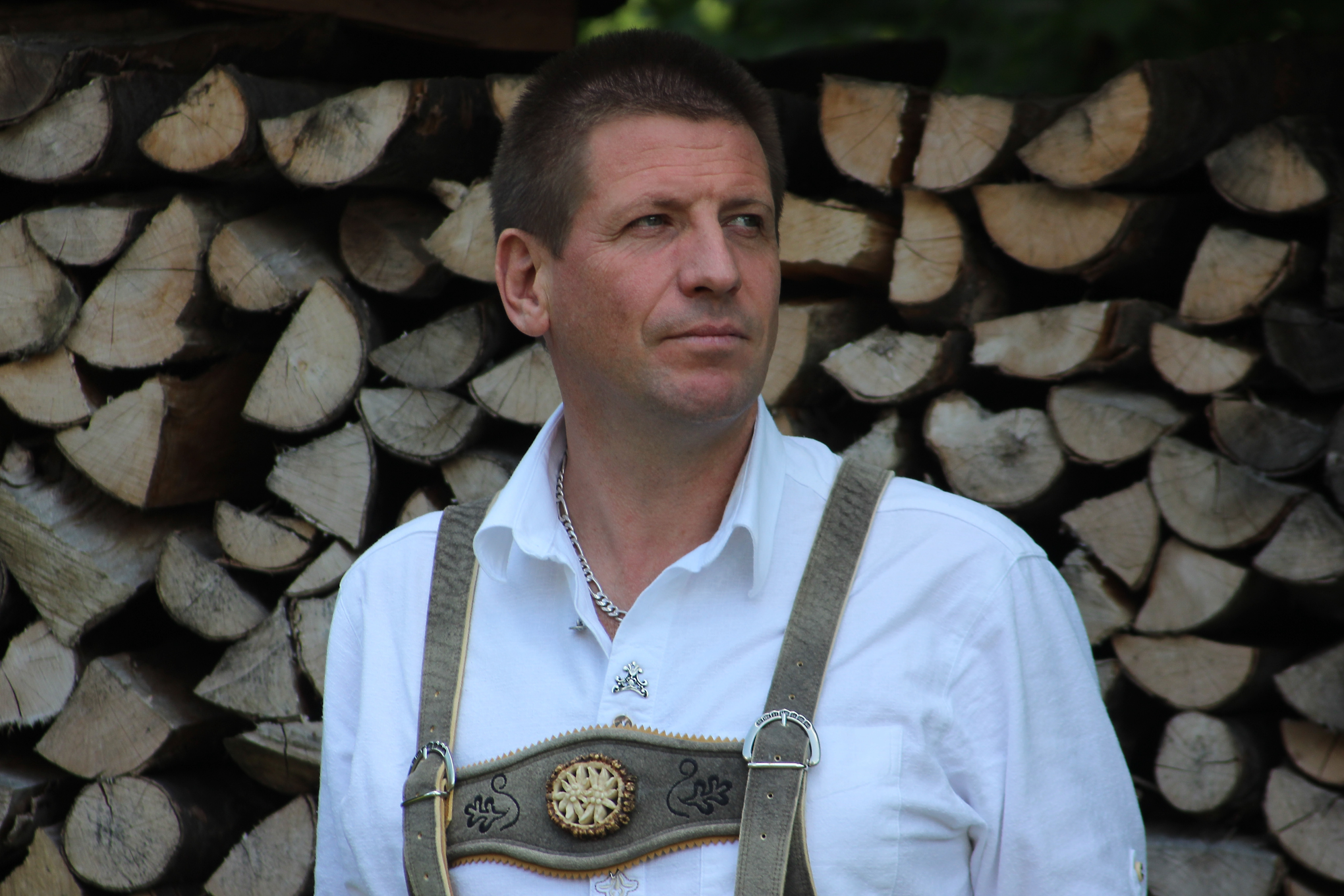 Mann vor Holzstoss im Trachtenhemd und Trachtenlederhose.